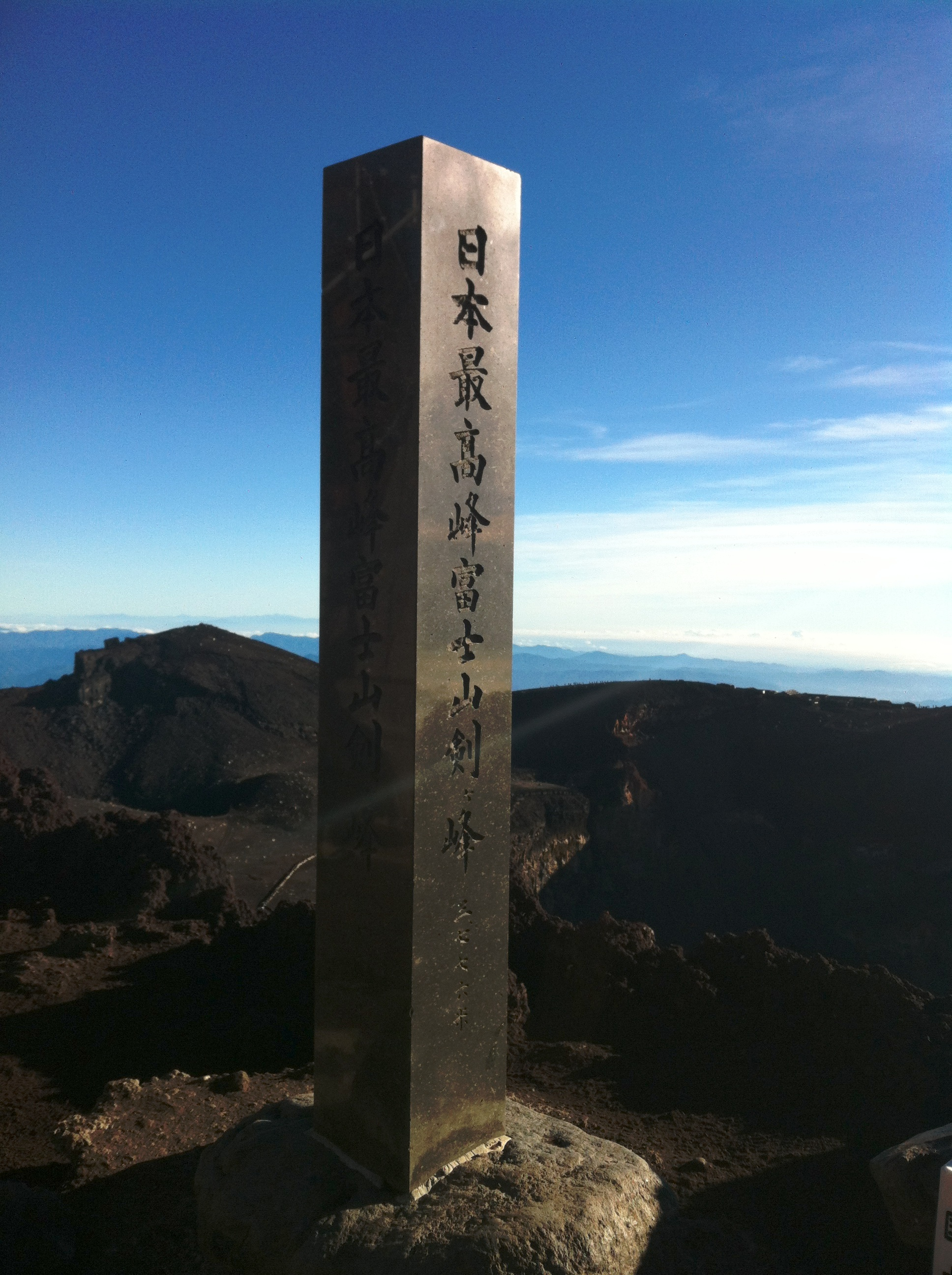 富士山山頂の剣ヶ峰に立つ石碑